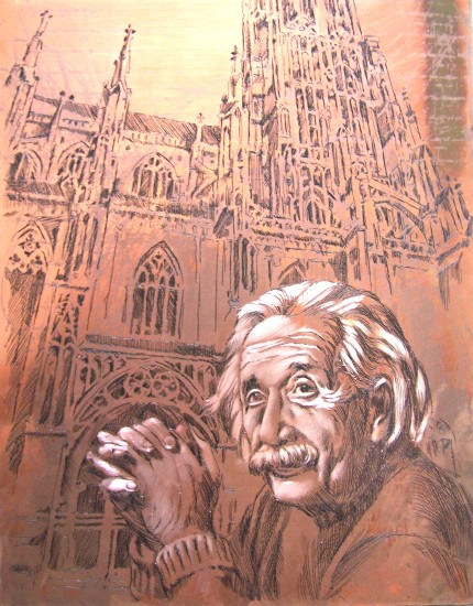 Kupferplatte. Strichätzung und geschabte Aquatinta. Motiv: Ulm